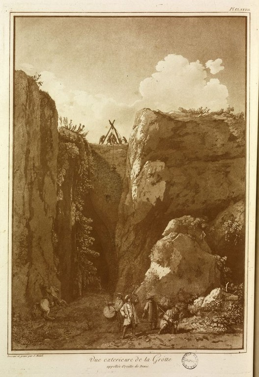 Veduta dell'interno della grotta chiamata Orecchio di Dionisio, vicino al grande teatro di Siracusa. Guazzo del 1777